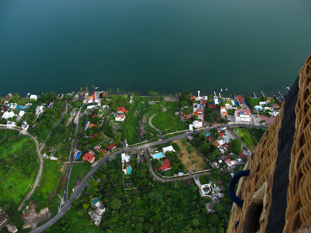 Vista desde globo aerostático